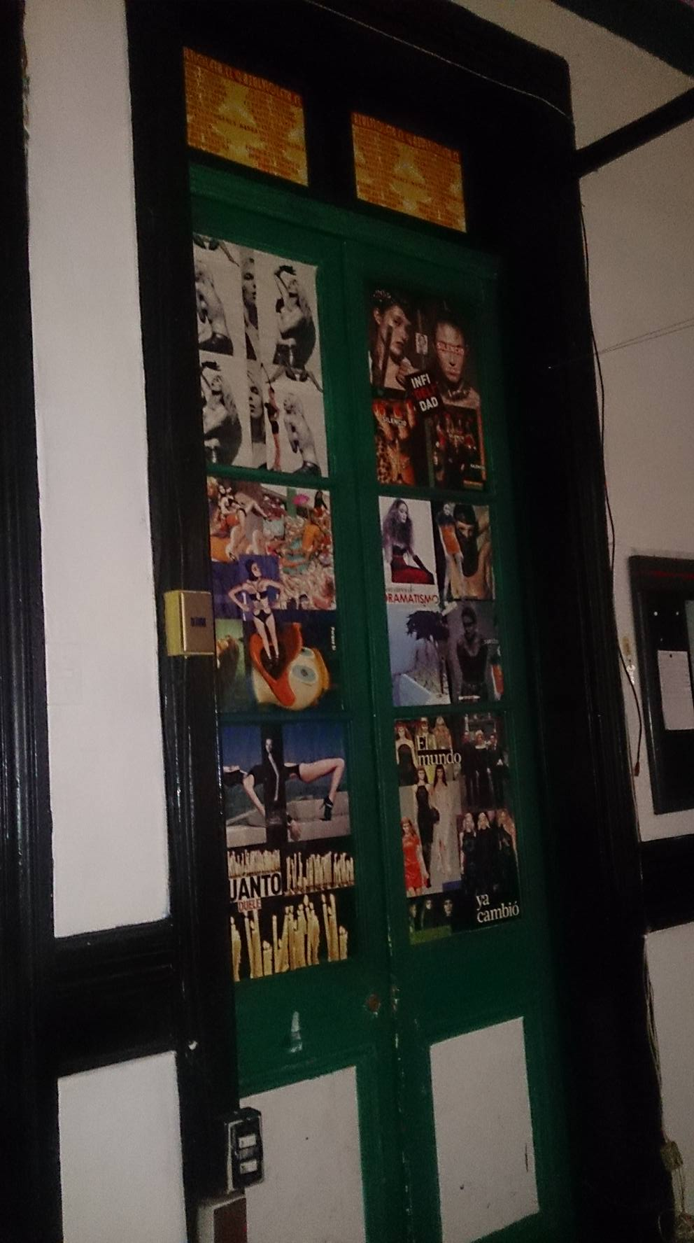 Puerta decorada con imágenes variadas